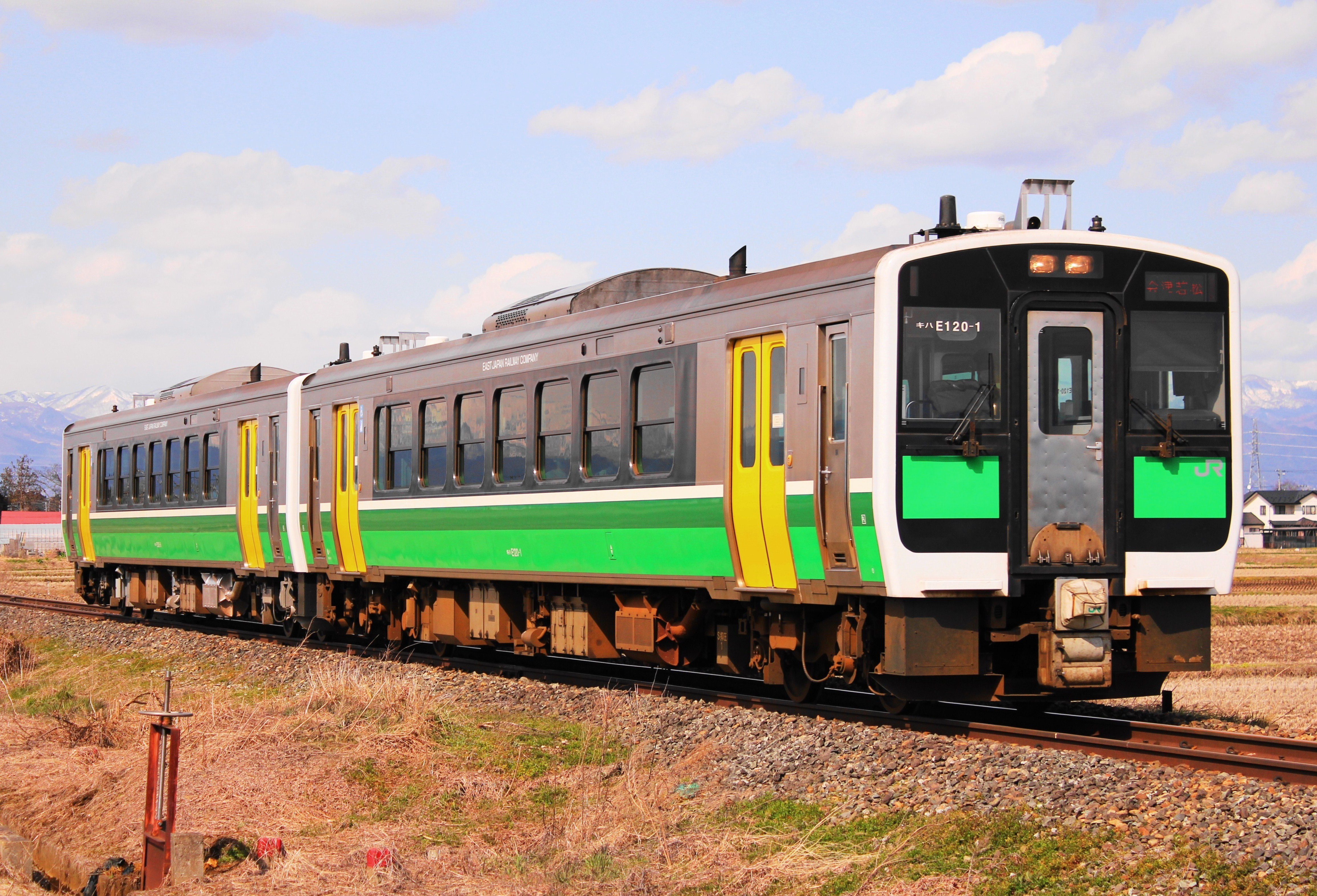 只 (ただ)見 (み)線の上り普通列車 〔会津川口発、会津若松行き〕 として運用されるキハE120-1・東北地域本社色。会 (あい)津 (づ)坂 (ばん)下 (げ) → 若宮 (わかみや)間を走行中。